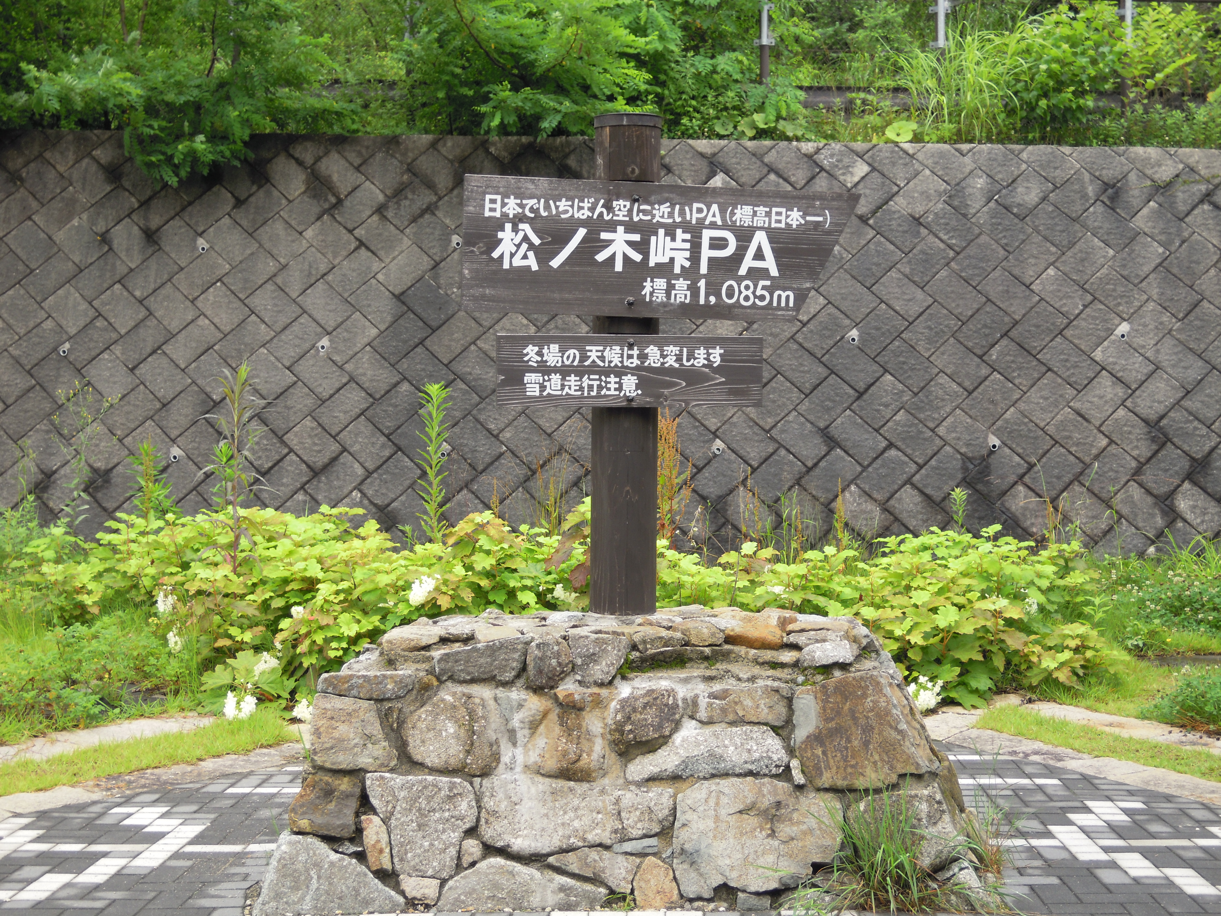 松ノ木峠パーキングエリアに設置された、日本最高所のPAである事を表す看板